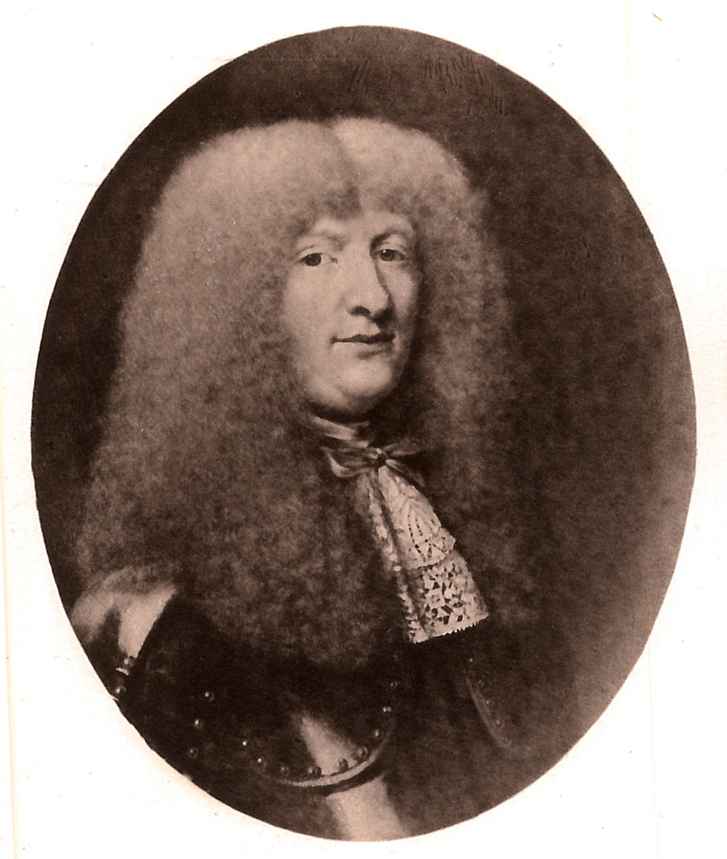 Hans Lindenov (1616-1659), original af Abraham Wuchters